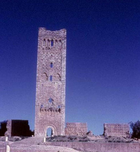 vestiges du minaret de Mansourah (14ème S.)